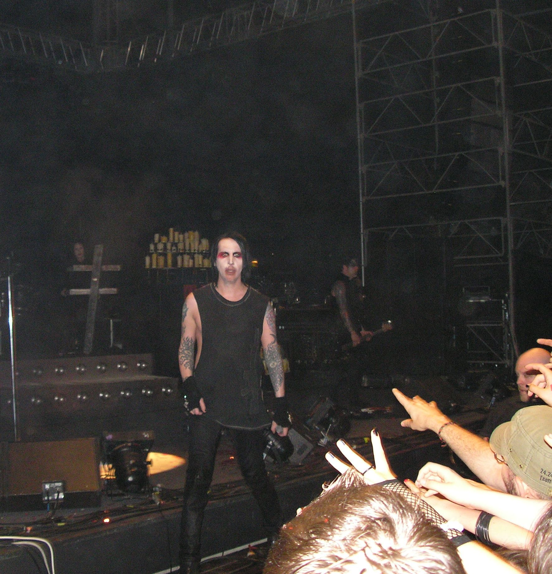 Marilyn Manson live in Ljubljana, Slovenia